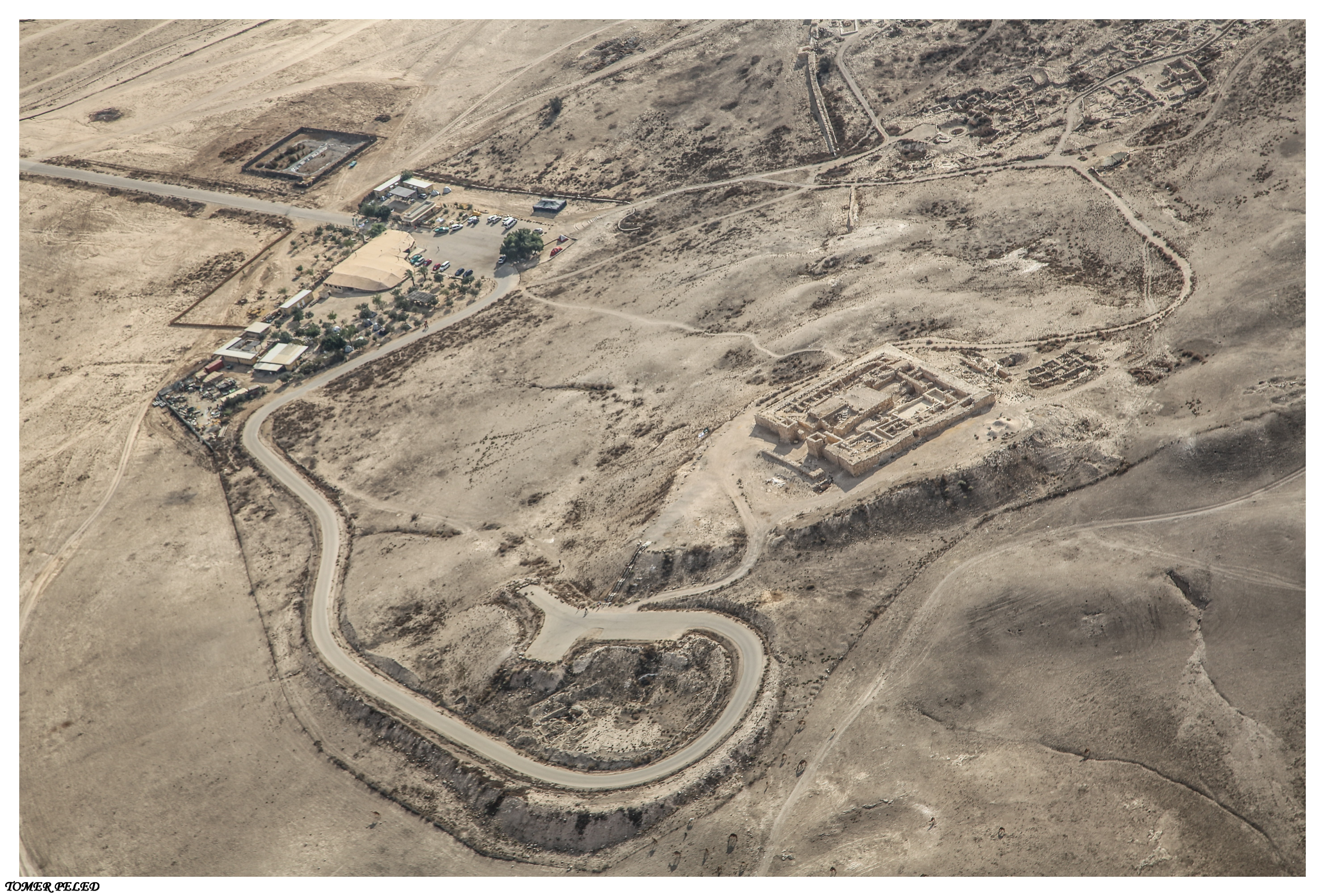 שרידי עיר גדולה ומרכזית בחלק המזרחי של בקעת באר שבע. בחפירות שנערכו בעיר (במשך 18 עונות) נחשף מרכז עירוני גדול מהאלף השלישי לפנה"ס. העיר הייתה מוקפת חומה. בחלק הגבוהה נחשפה מצודה ממלכתית עם מקדש. כן נחשף ארכיון.